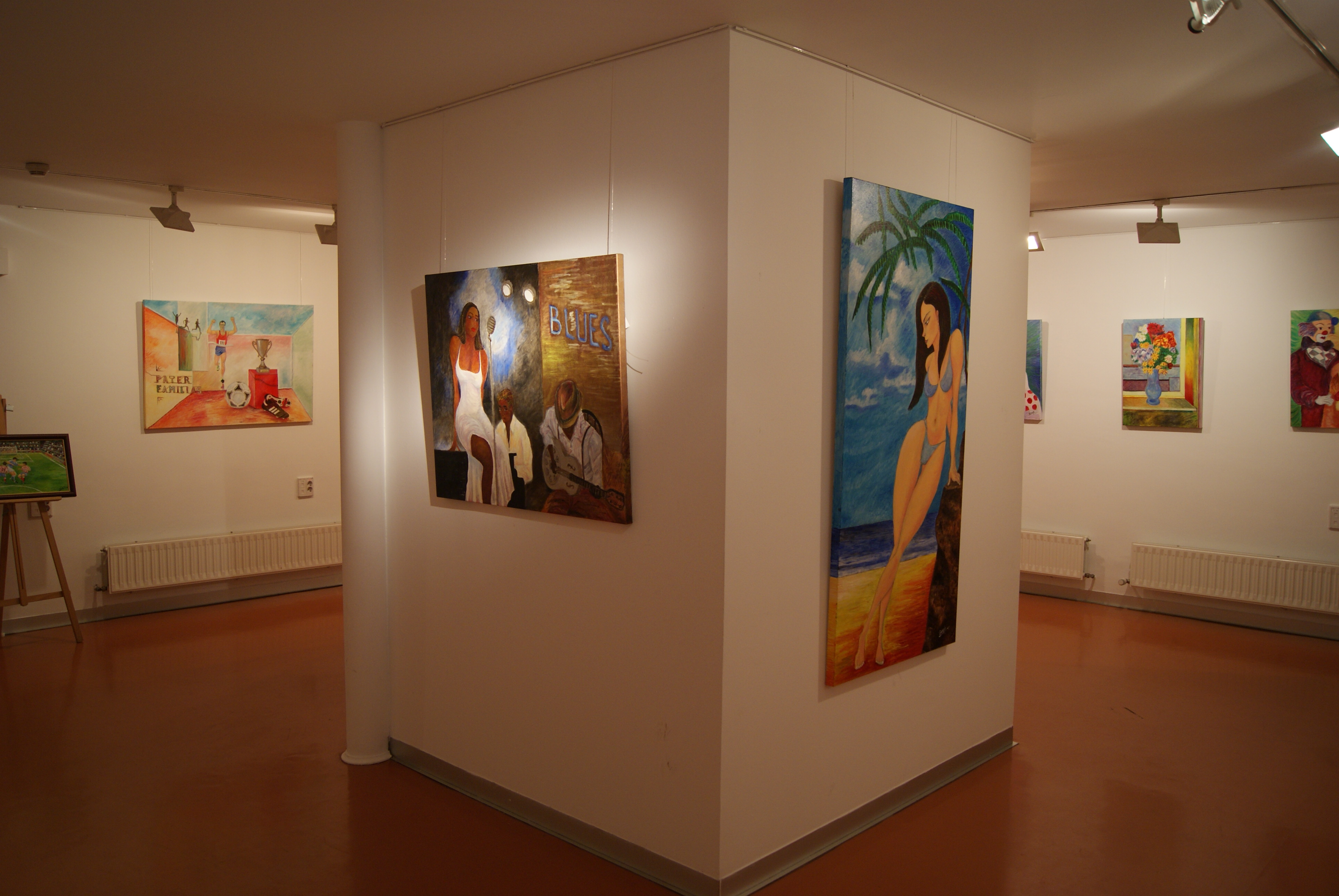 Colección de Pintura Arte Dimensión